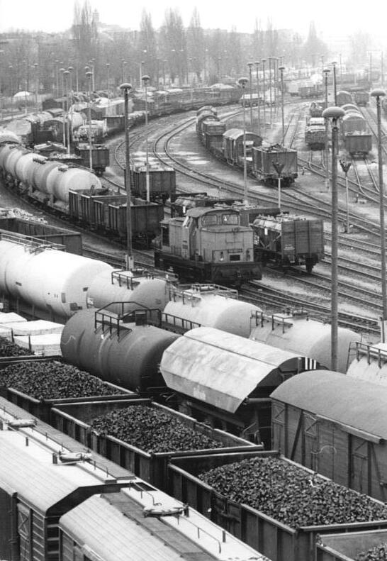 ADN-ZB-Schindler-27.12.80-Berlin: Auf dem Rangierbahnhof Berlin-Pankow werden täglich durchschnittlich 50 Güterzüge aufgelöst und umgestellt. Ca. 1.66o Wagen werden rund um die Uhr bewegt, um neue Züge für die nördlichen und südlichen Bezirke der DDR zusammenzustellen. Dieser Rangierbahnhof ist einer der wichtigsten im Stadtgebiet von Berlin. siehe auch W1227-10N